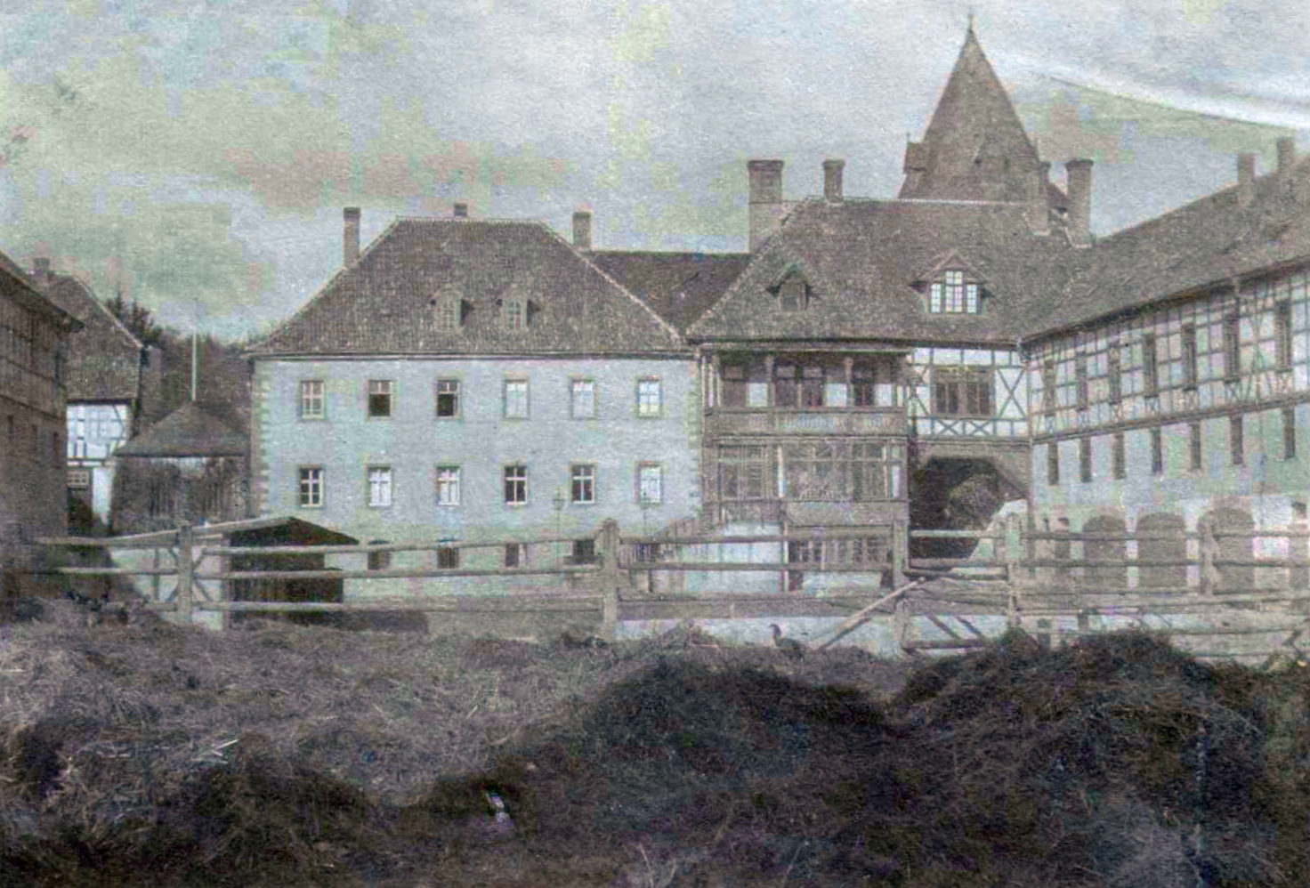 Gut Volkenroda bei Körner in Thüringen, Anfang 20. Jahrhundert